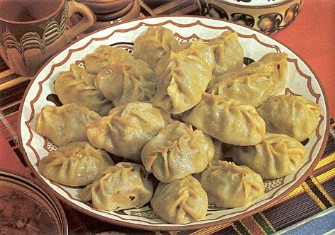 Казахские манты